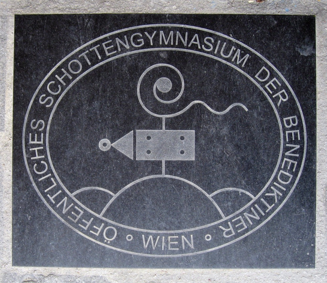 Wien Schottengymnasium Emblem